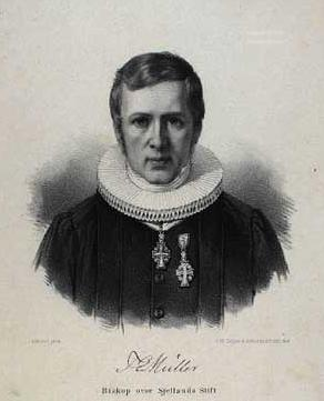 Litografi portrætterende Peter Erasmus Müller (1776-1834)